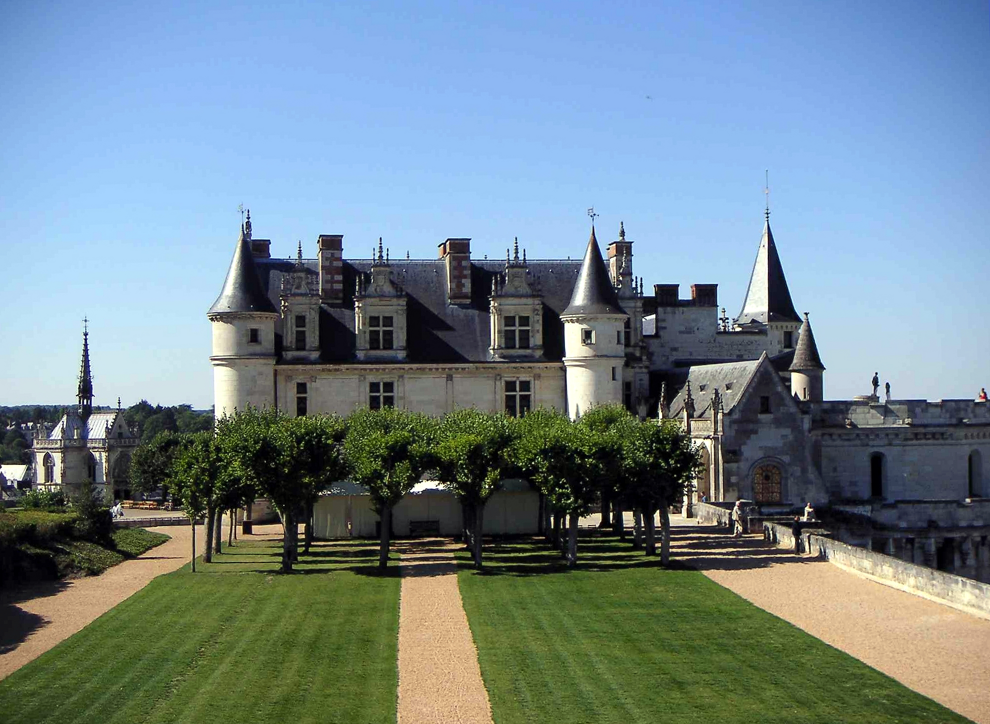 Façade Est du château d'Amboise avec le jardin de Naples. Auteur : LonganimE (19/sept/2005)